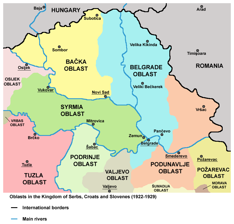 Oblasts in the Kingdom of Serbs, Croats and Slovenes (in Vojvodina region), 1922-1929. Области у Краљевини Срба, Хрвата и Словенаца (на подручју Војводине), 1922-1929. године.